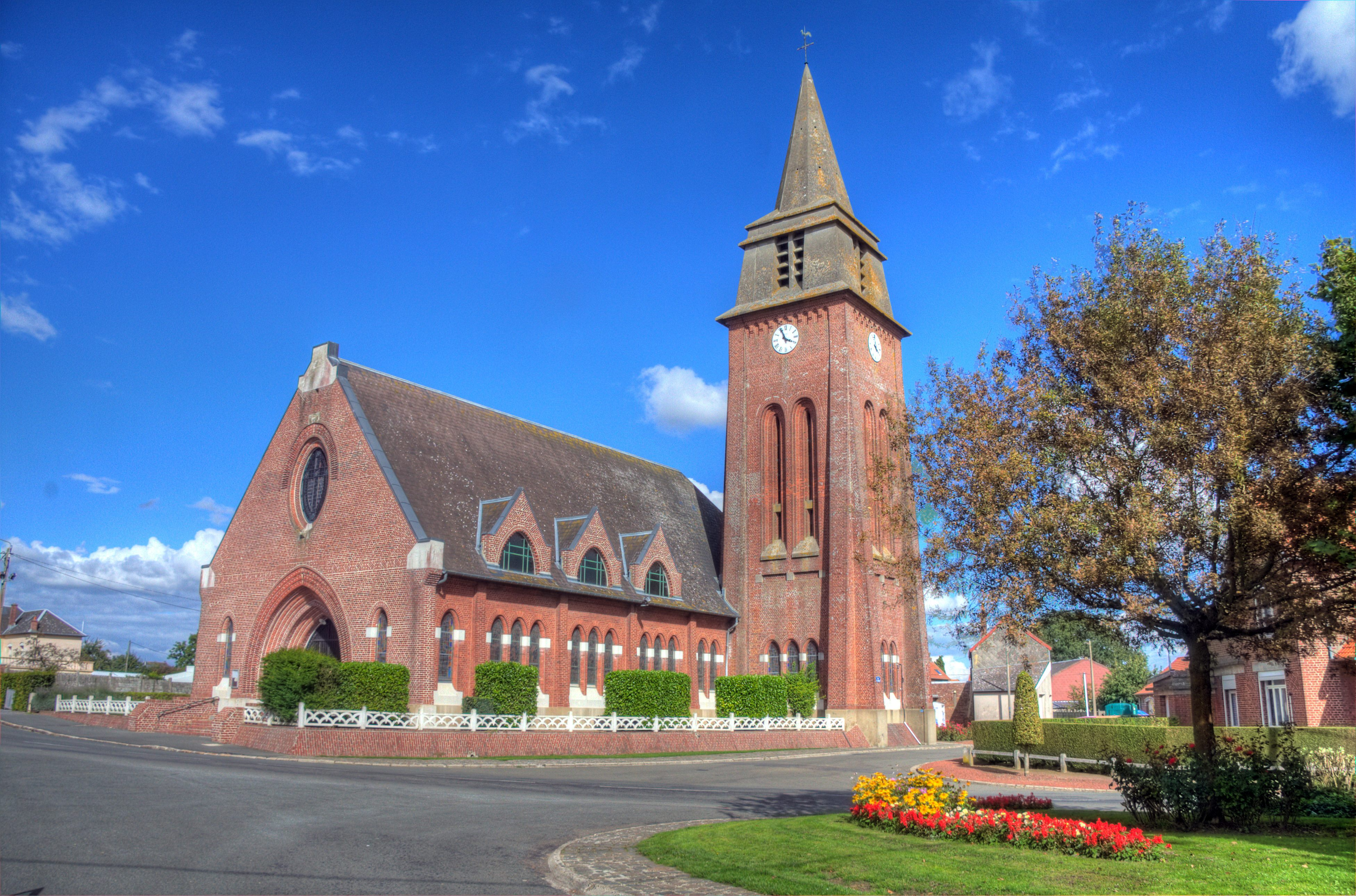 L'église de Bertincourt